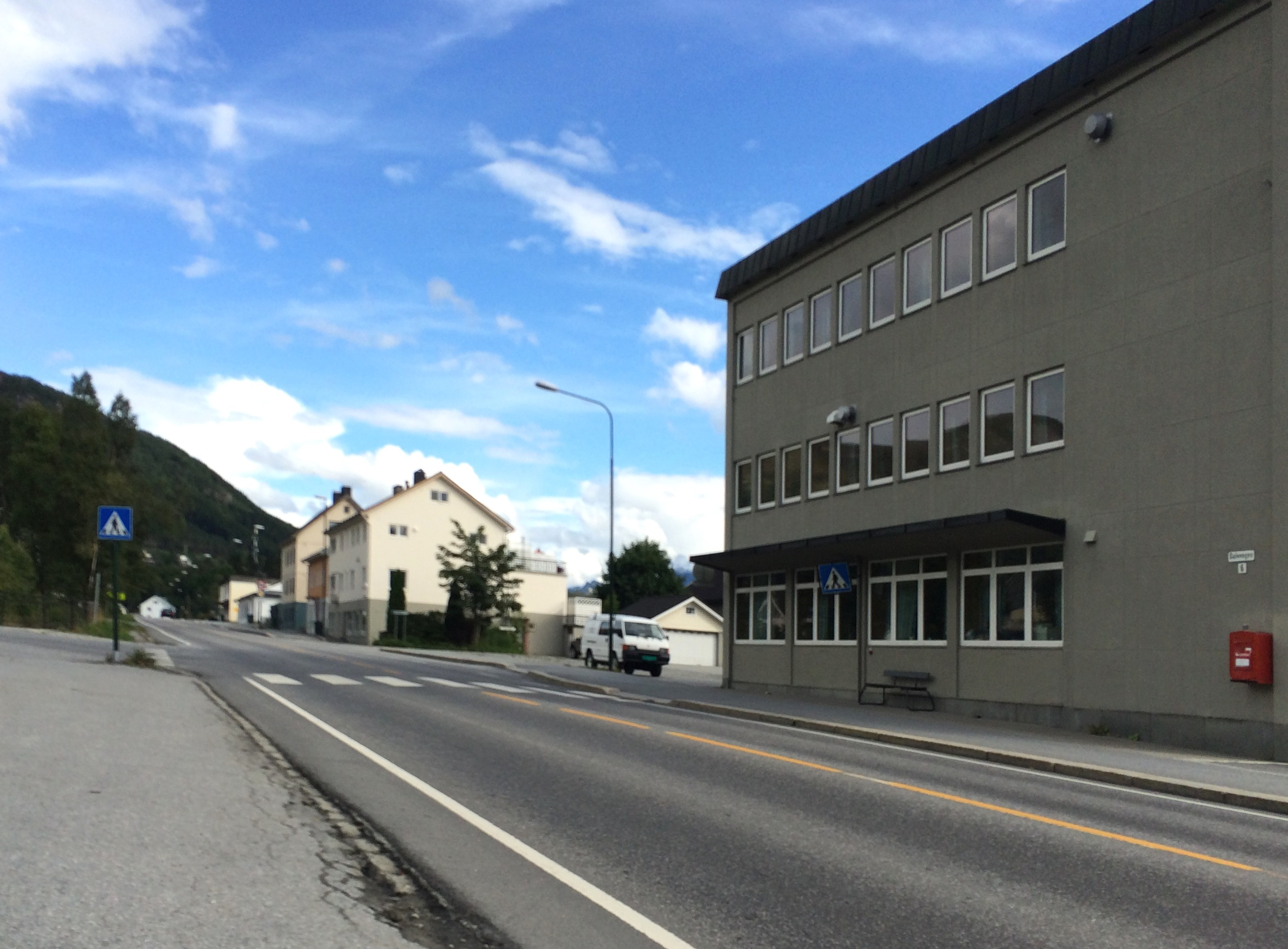 Fylkesvei 655 begynner i Ørsta, like ved Ørsta kirke.